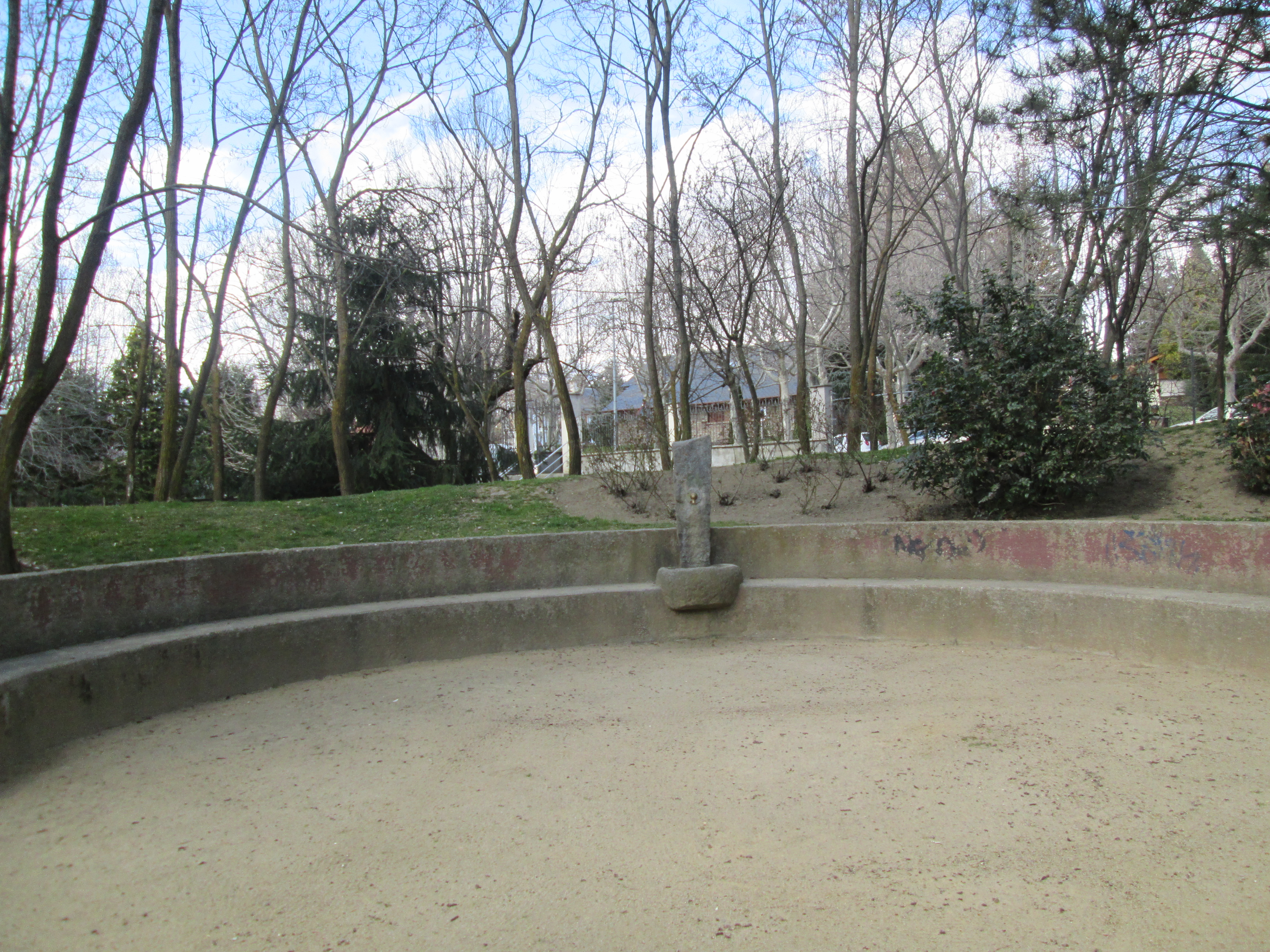 llac març 2014